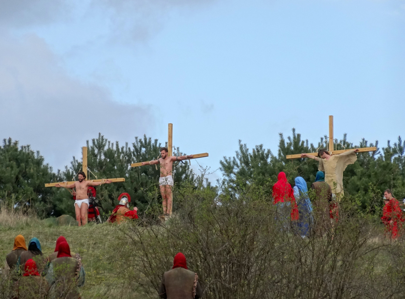 Misterium Męki Pańskiej w Dolinie Śmierci w Bydgoszczy 2014